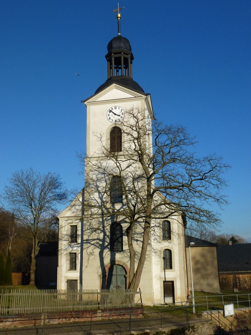 Kirche in Remse